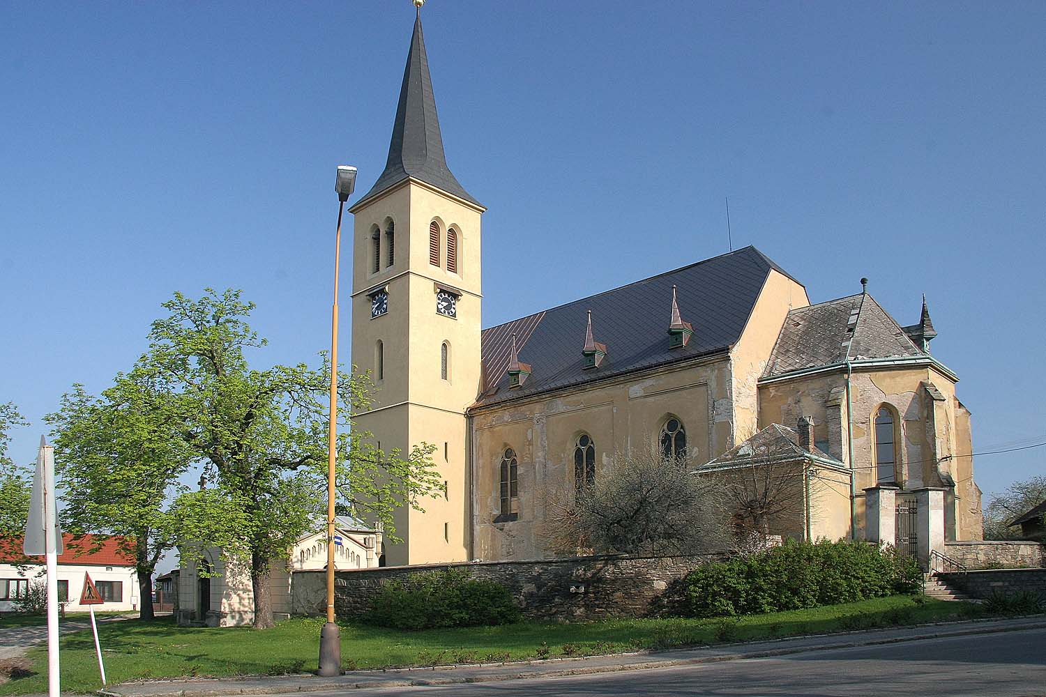 Kostel Svatého Jakuba Většího v Ovčárech u Kolína, Kolín district autor: Prazak date:5. 5. 2006